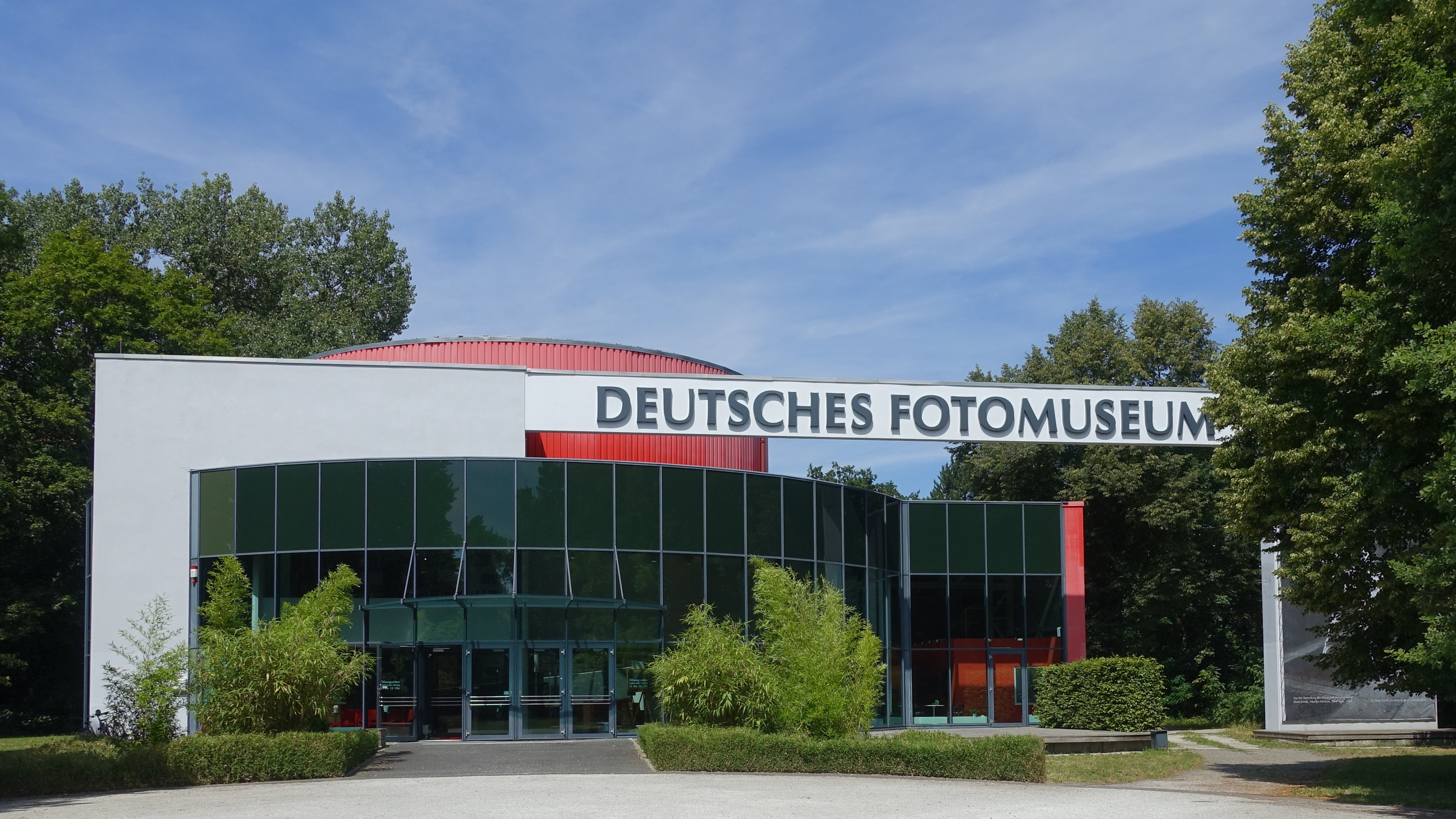 Deutsches Fotomuseum - Außenaufnahme des Gebäudes vom Juli 2019